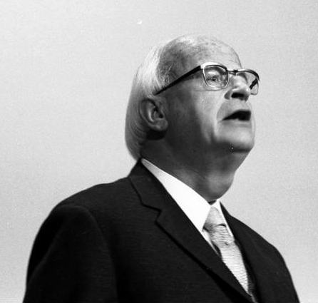 22. Bundesparteitag der CDU in Hamburg (Helmut Thielicke) 18.-20.11.1973